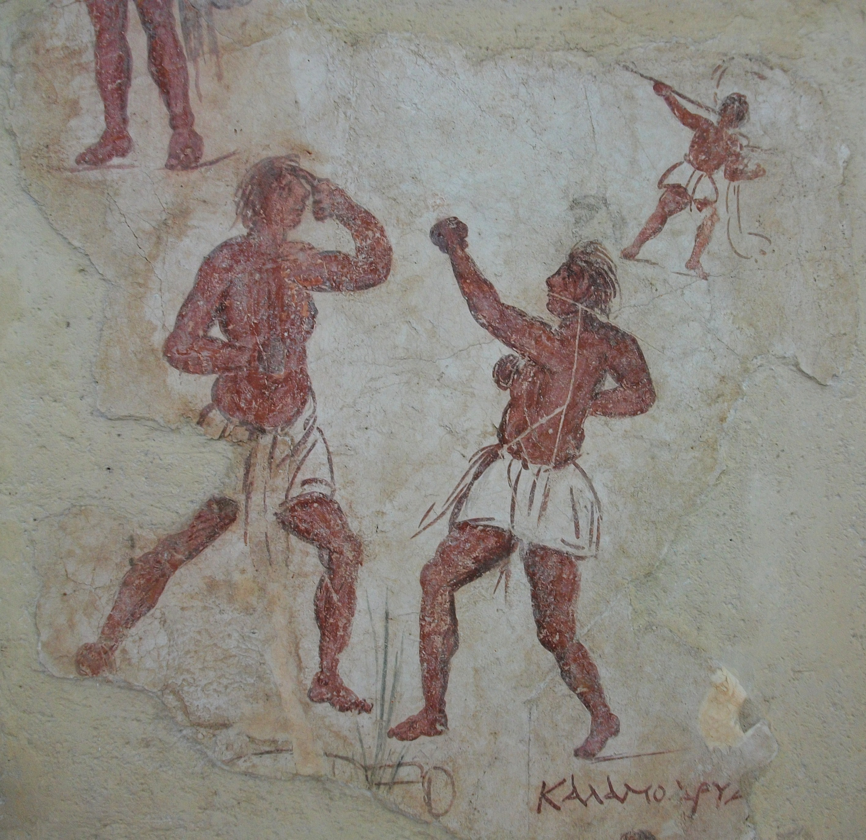 Detall del fresc de la façana de la casa a l'oest de la casa del Turó. Dos lluitadors i un trompeters, segle II-I aC. Museu Arqueològic de Delos.